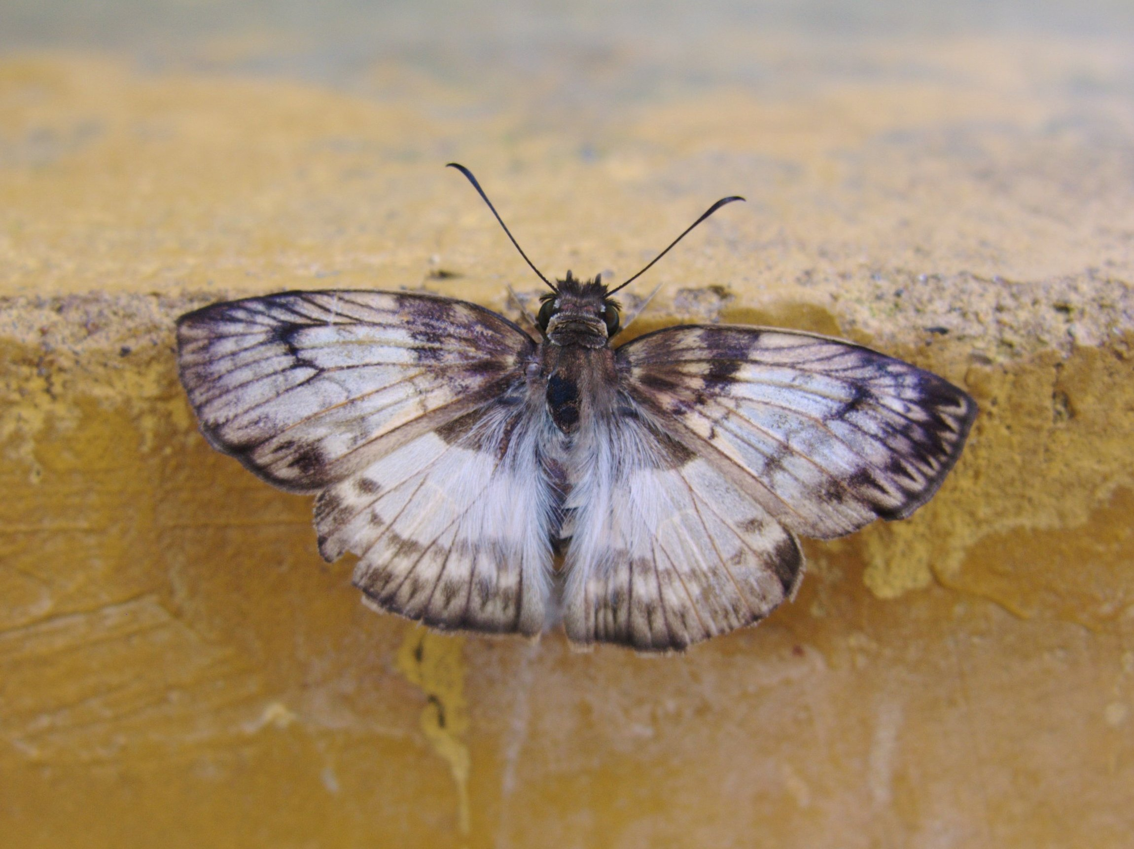 Mylon menippus, Hesperiidae, Pyrginae - 18/01/2007 - Foz do Iguaçu